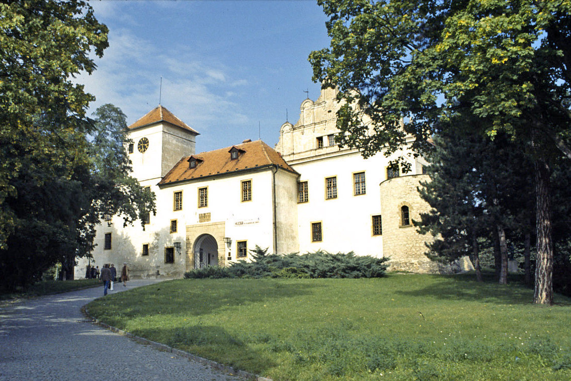 Blansko castle, Czech Republic